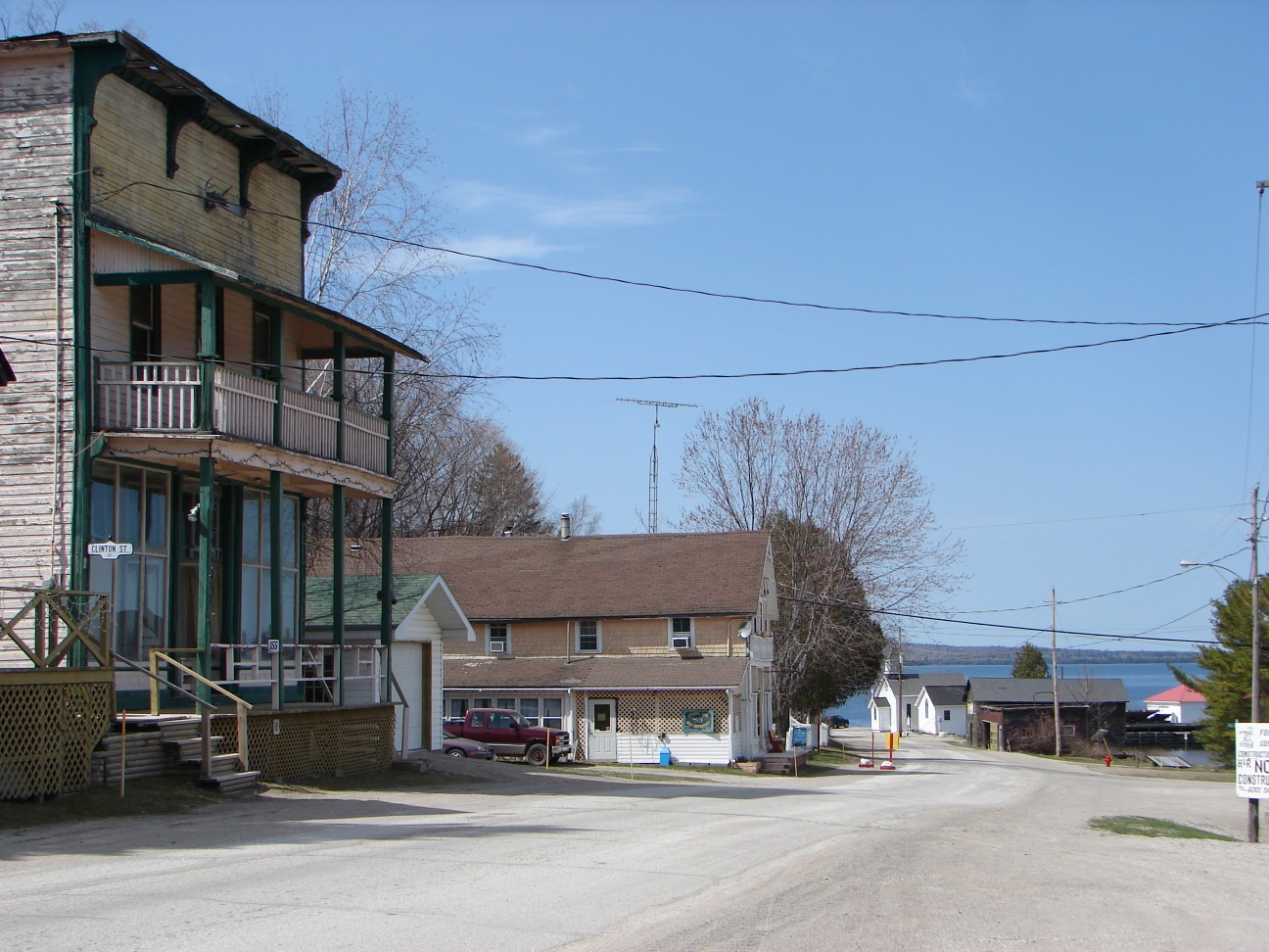 Kagawong, Manitoulin Island, Ontario, Canada